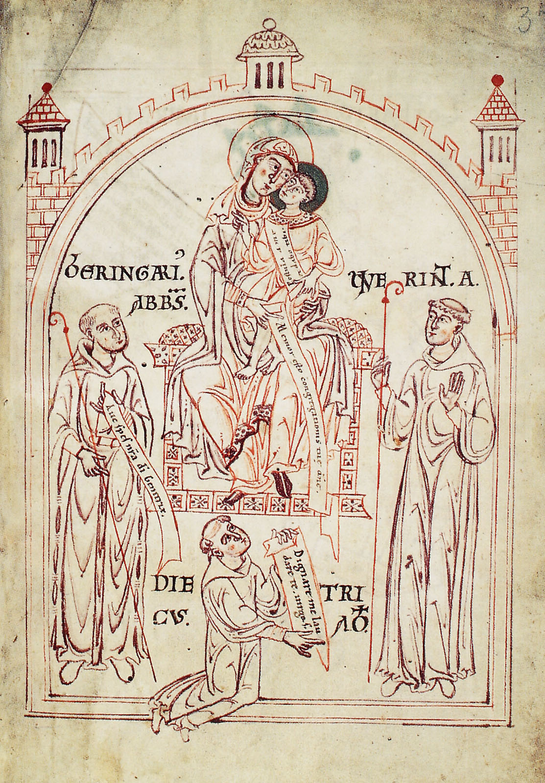 Kopialbuch des Klosters Vornbach ( Formbach ) [Abt. 1 Bestand Kl. Formbach Lit. 1, fol. 2 recto, Maria mit Vornbacher Äbten] München, Bayerisches Hauptstaatsarchiv Bildnachweis